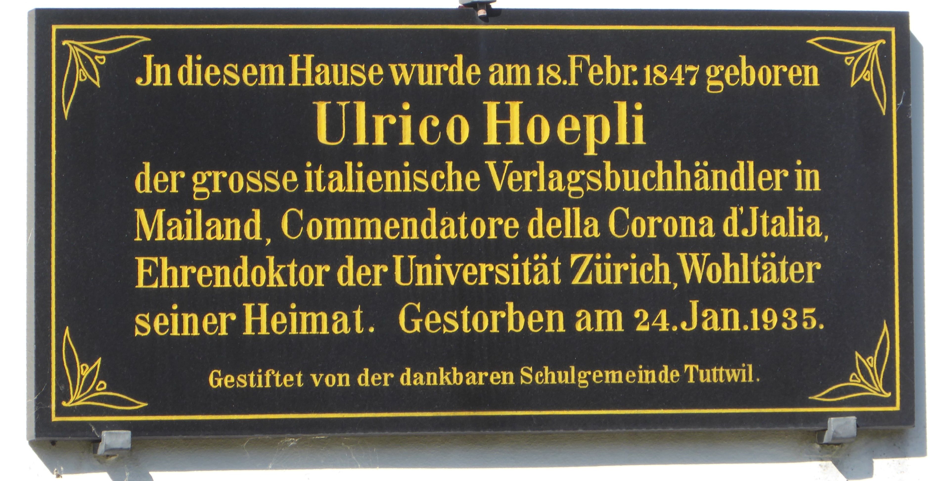 Schild am Wohnhaus Hoepli, Ulrico-Höpli-Strasse 3 in Untertuttwil